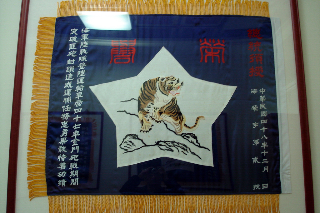 國軍歷史文物館展示中華民國海軍陸戰隊登陸運輸車營在1958年金門砲戰後獲總統頒授之虎旗。